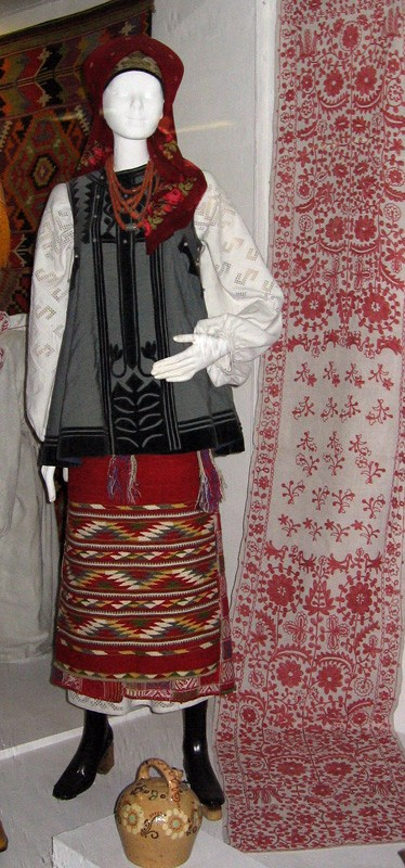 Центральноукраинский праздничный наряд, женский. Женский костюм (праздничный) в регионах Центральной Украины. Собрание музея этнографии во Львове.